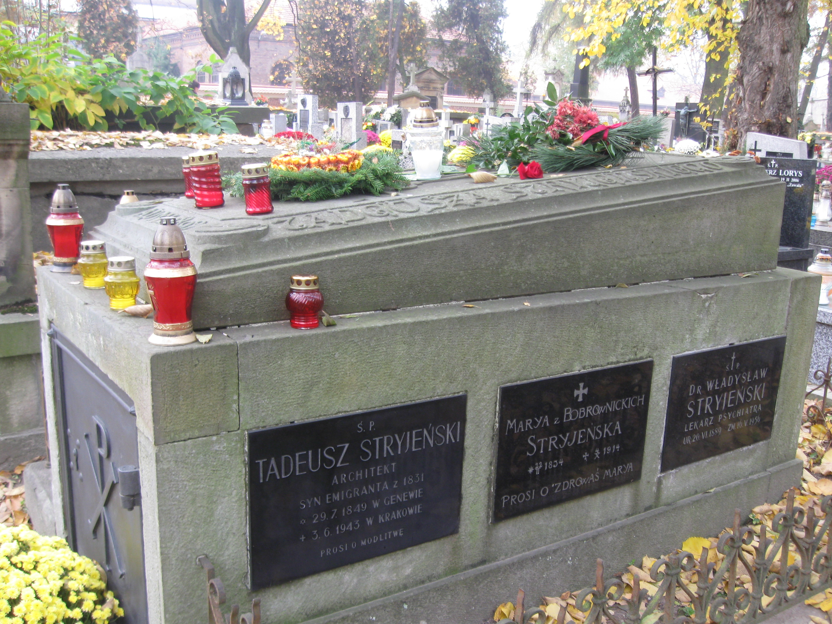 Grobowiec rodziny Tadeusza Stryjeńskiego na Rakowicach.